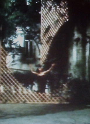 Vue de l'installation Carlotta's Smile et chorégraphie en collaboration avec Michala Marcus